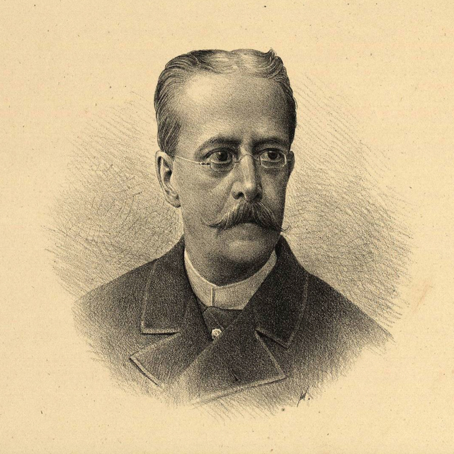 El médico Manuel Carmona y Valle en una litografía publicada en 1888 por Ireneo Paz en su libro "Los hombres prominentes de México".